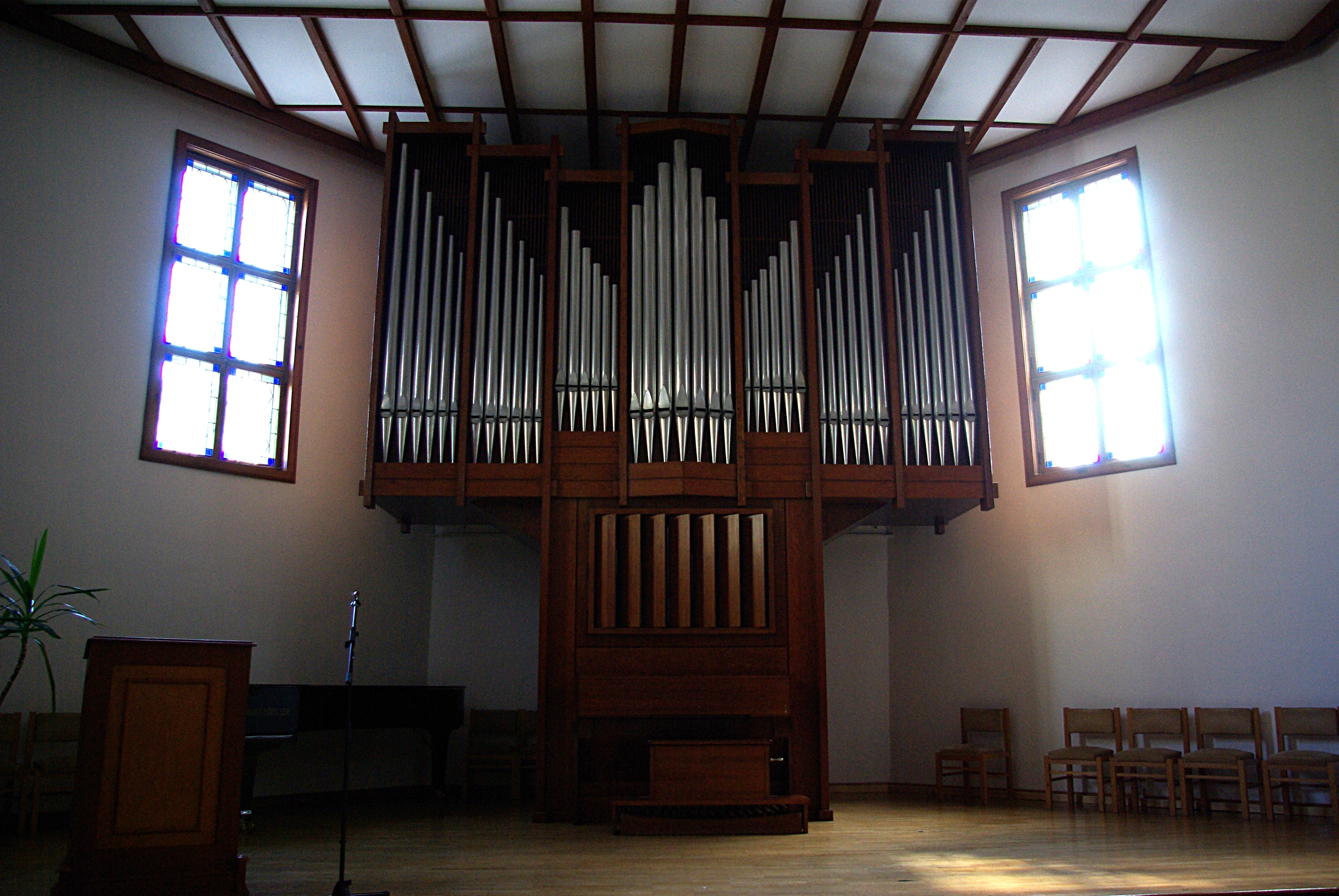 BAd Freienwalde (Oder) in Brandenburg. Die Kirche St. Georg befindet sich an der Königsstraße in Bad Freienwalde. Die Orgel wurde von der Firma Sauer aus Frankfurt (Oder) im Jahre 1988 erstellt.